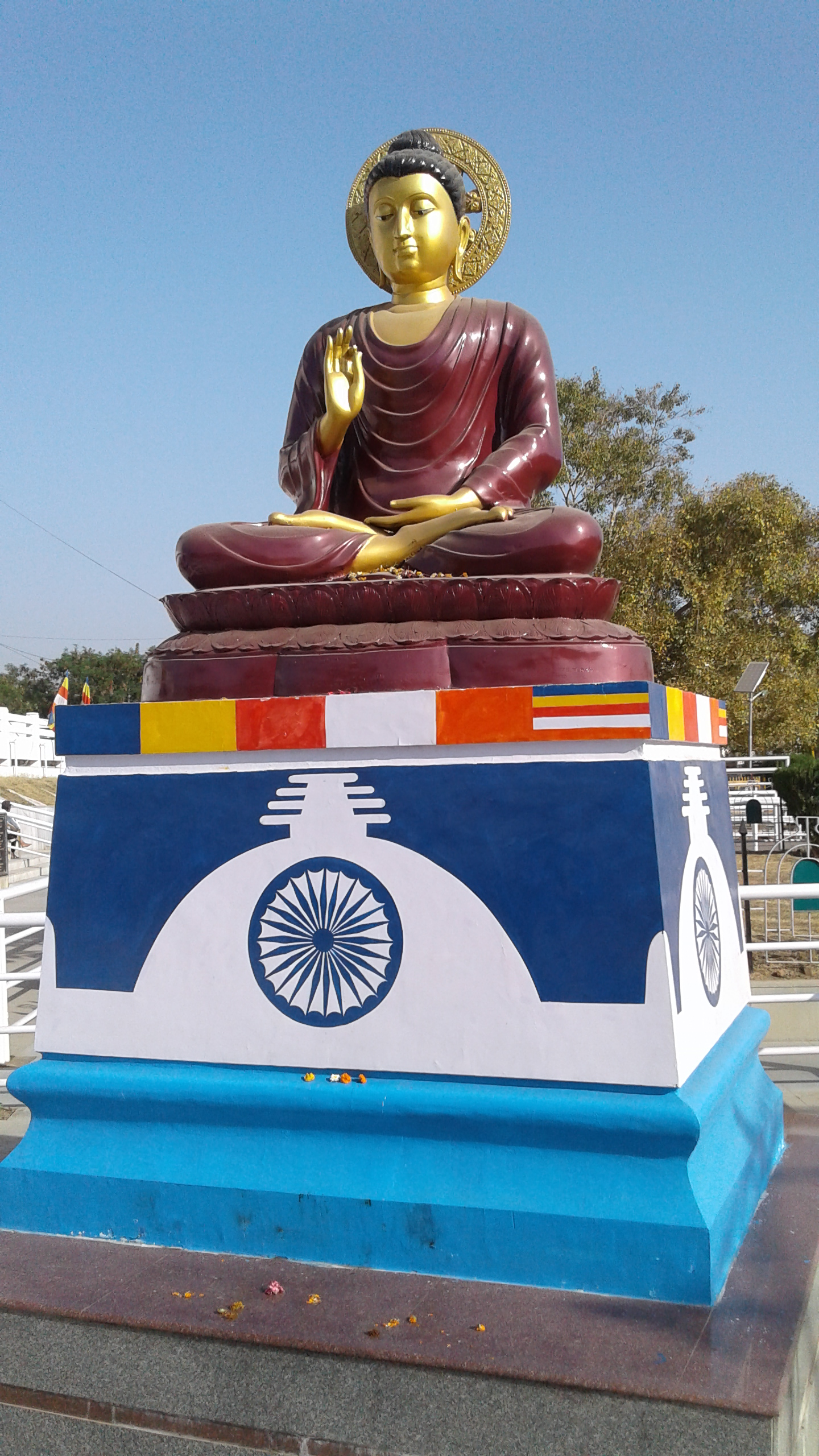 दीक्षाभूमी मधील तथागत बुद्धांची मुर्ती